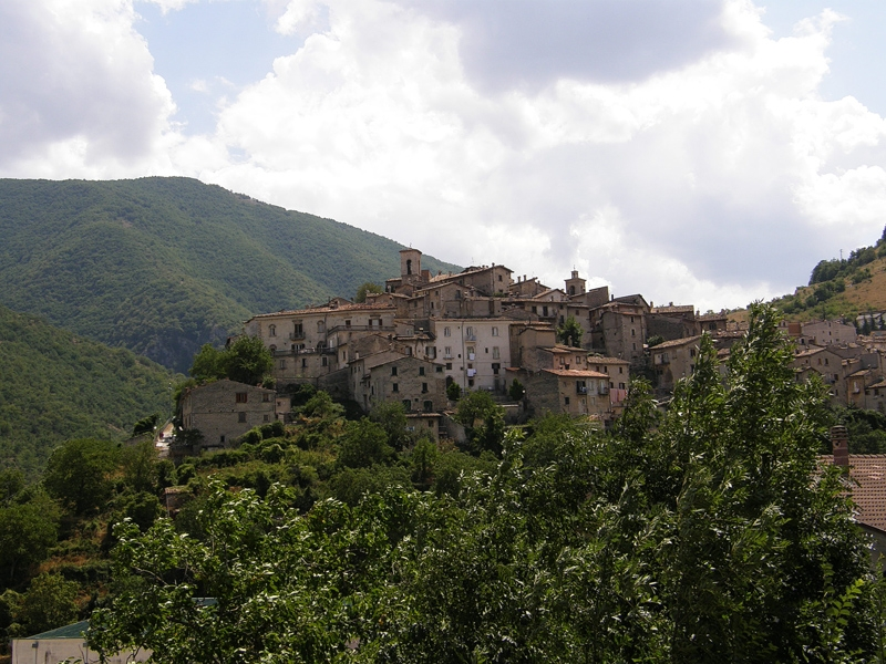 Scanno 2009